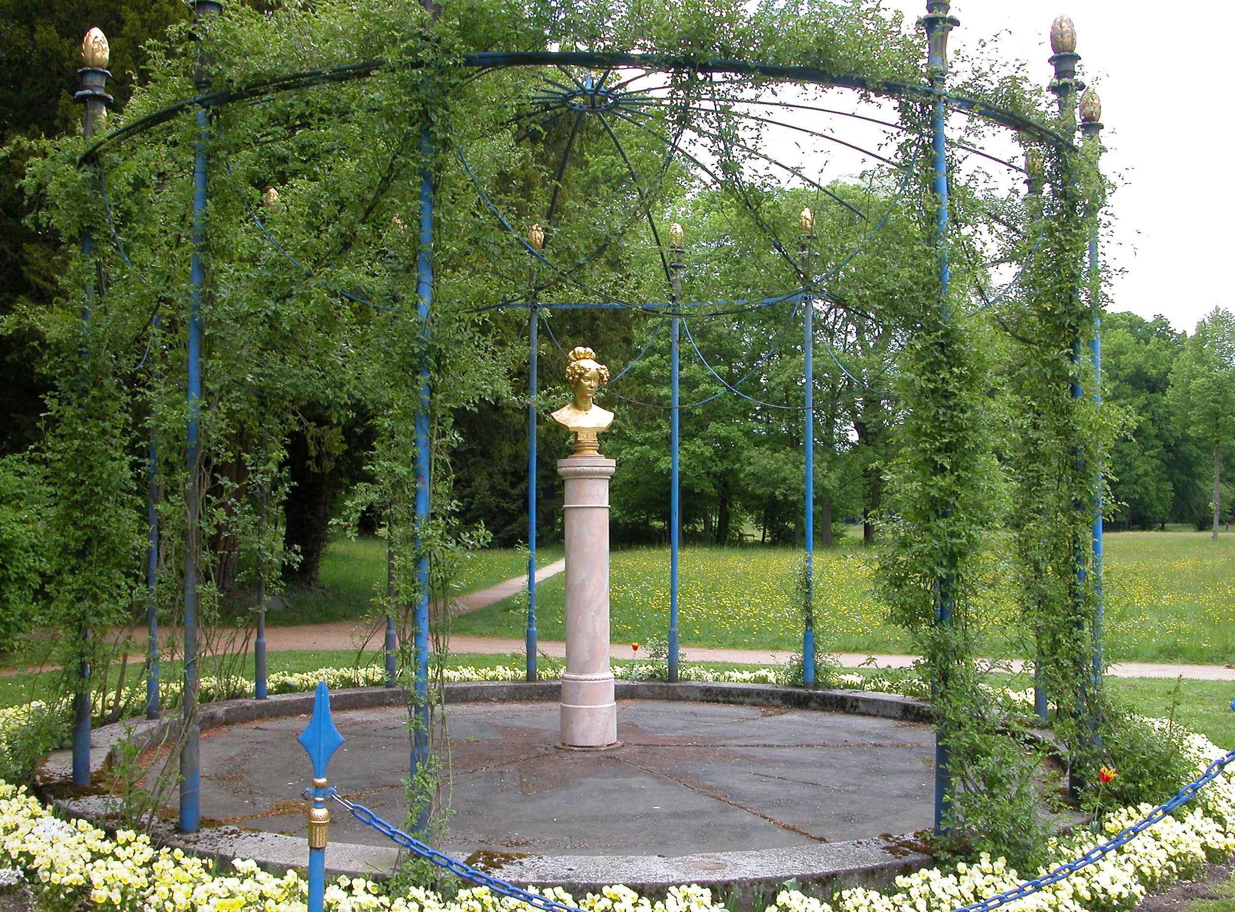 13.05.2015 03042 Branitz (zu Cottbus): Fürst-Pückler-Park Branitz. Büste der Henriette Sontag. Herrschaft Branitz gelangte 1696 in den Besitz der Grafenfamilie Pückler. 1846 bis 1871 legte Hermann Fürst Pückler-Muskau den Landschaftspark an. [DSCN5634.JPG]20150513370DR.JPG(c)Blobelt